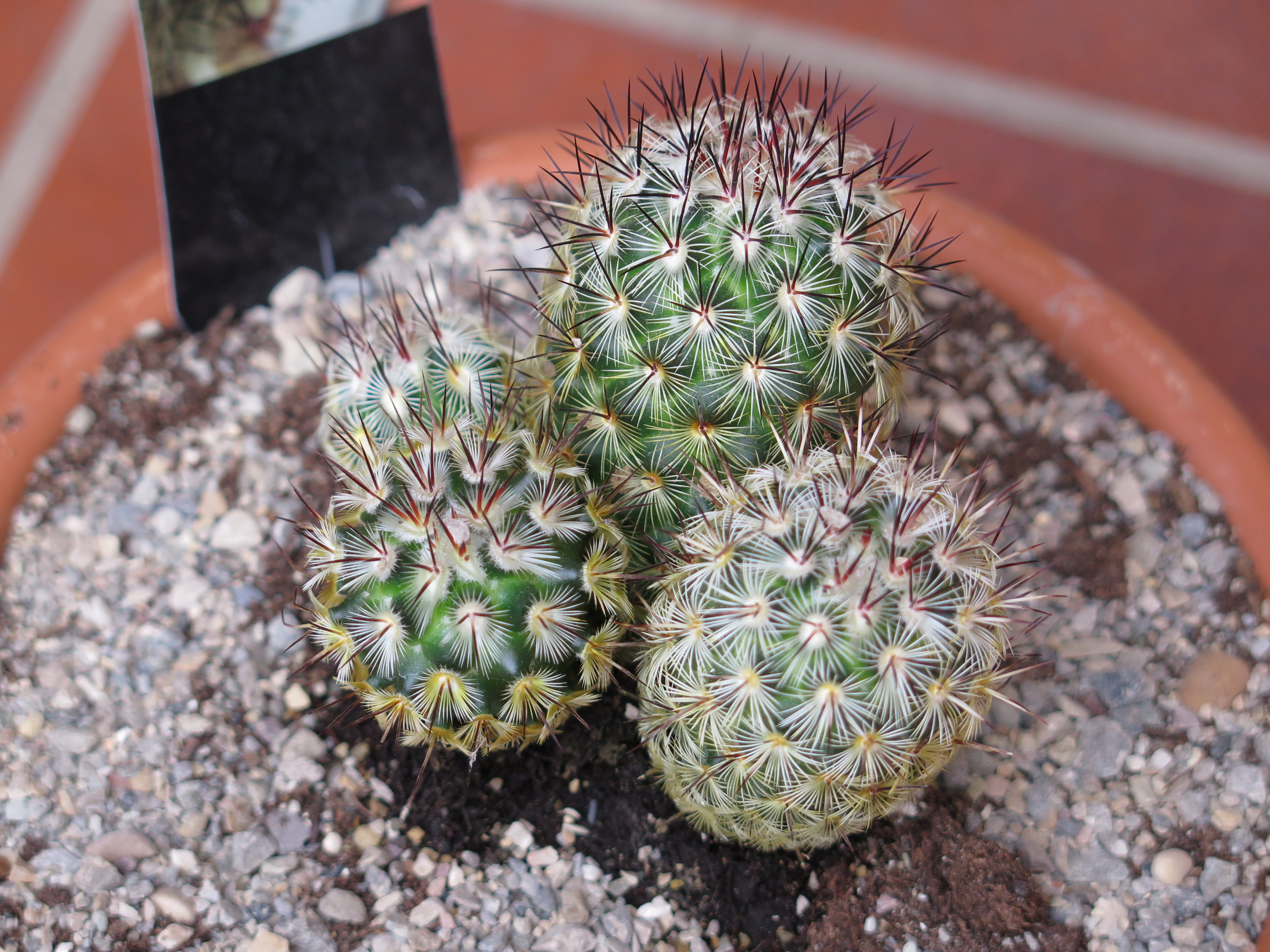 Mammillaria microhelia